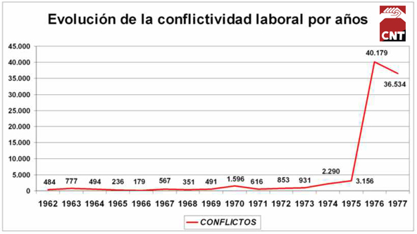 Evolucion de la conflictividad